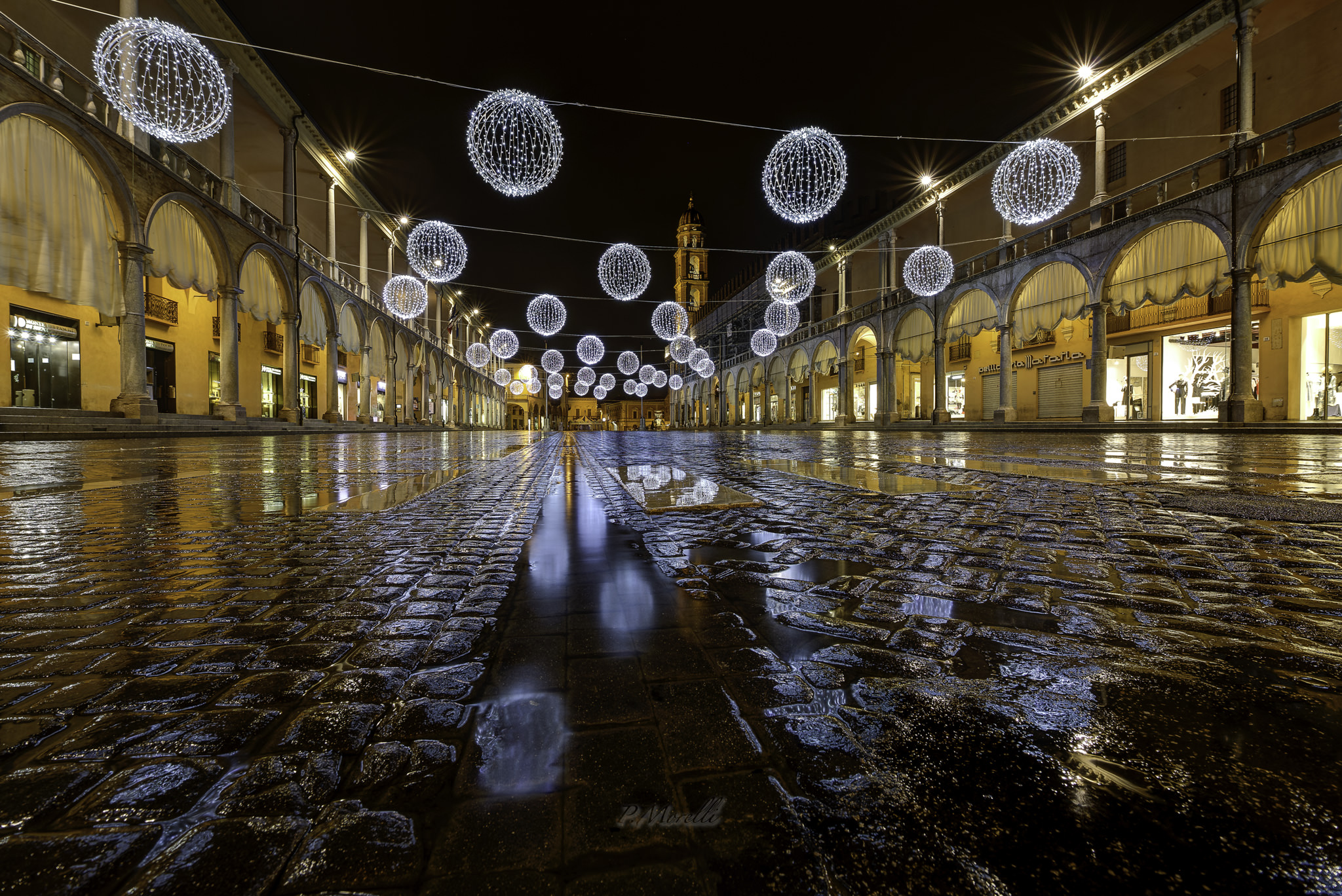 Piazza del Popolo in periodo natalizio. Foto Paolo Morelli